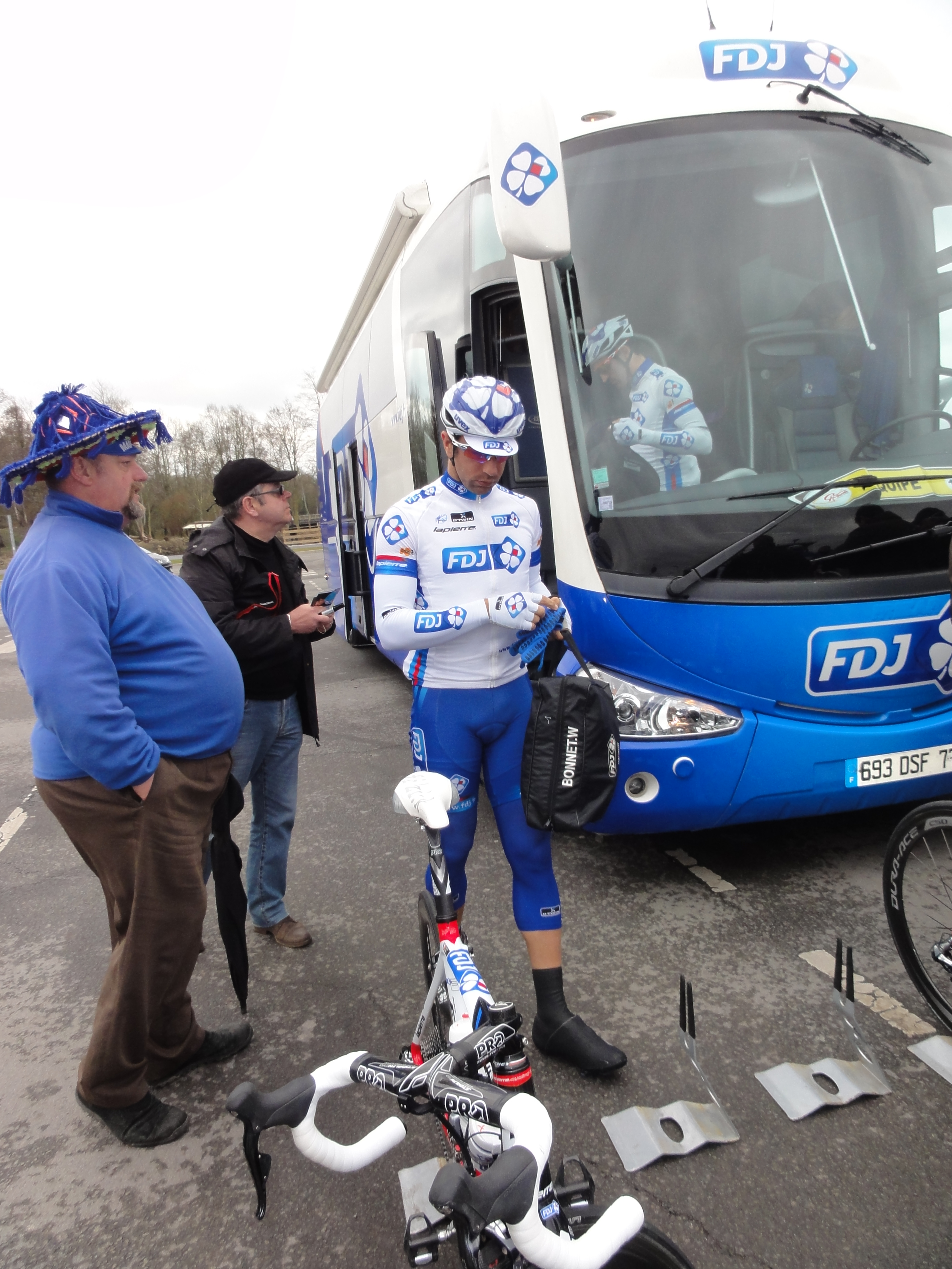 Reportage photographique réalisé le mardi 11 avril 2013 durant l'édition 2013 du Grand Prix de Denain à Denain, Nord, Nord-Pas-de-Calais, France. Depicted person: William Bonnet